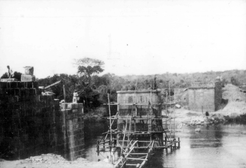 Ponte Velha 1914